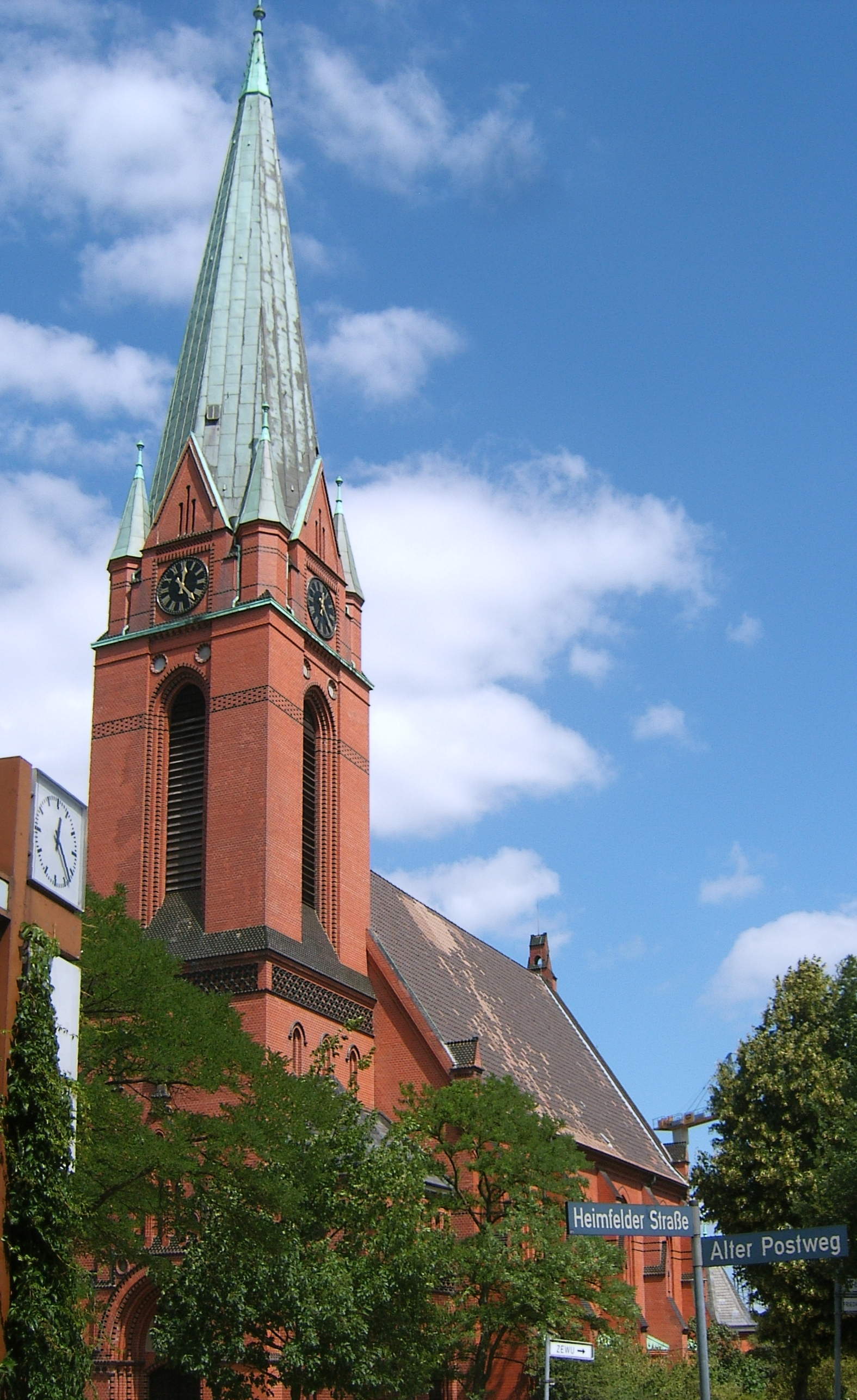 Bildbeschreibung: Hamburg-Heimfeld, evangelisch-lutherische Pauluskirche, erbaut 1907 Fotograf: selbst Datum: 14.07.2006